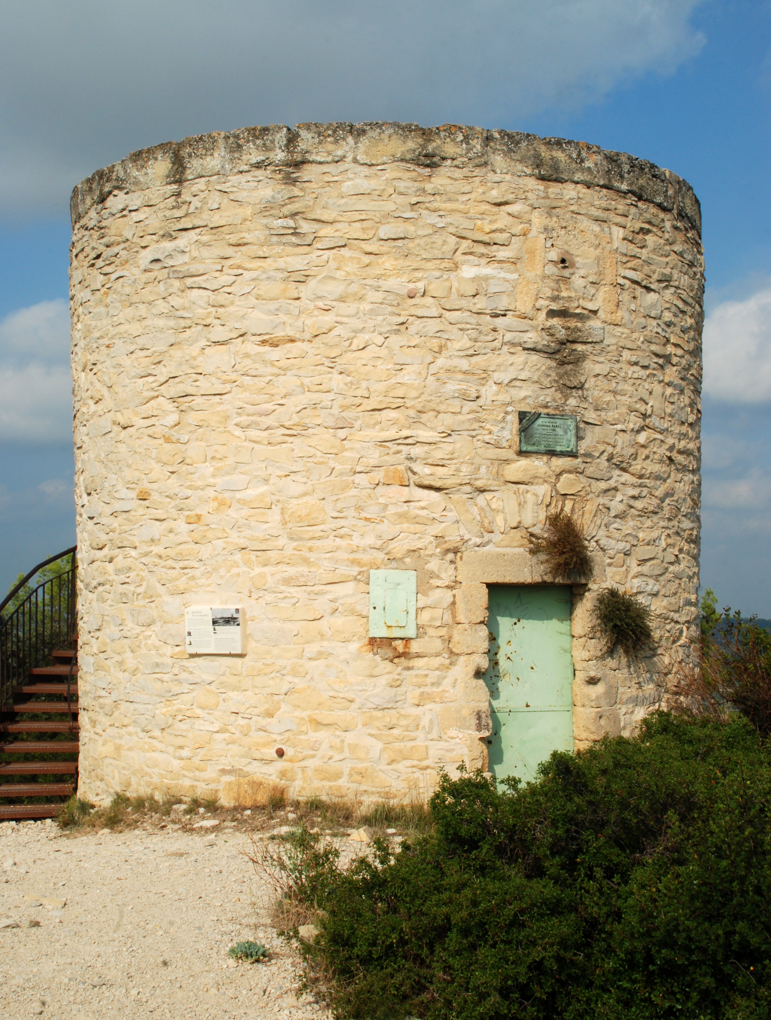 France - Gard - Calvisson - Roc de Gachone